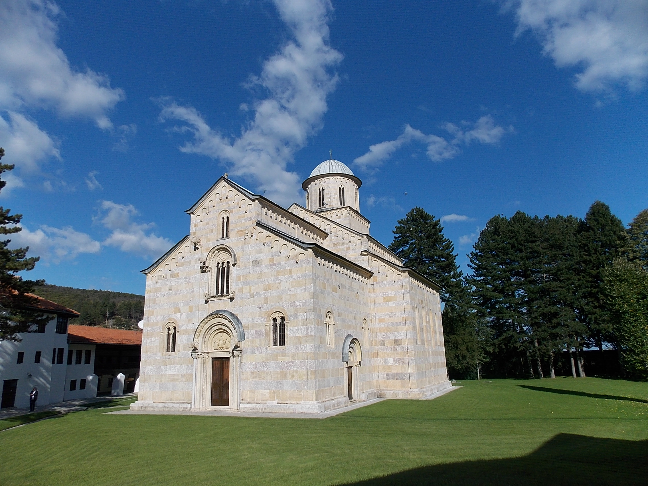 Српски (ћирилица): Манастир из 14ог века. Задужбина Светог Стефана Уроша III Дечанског.